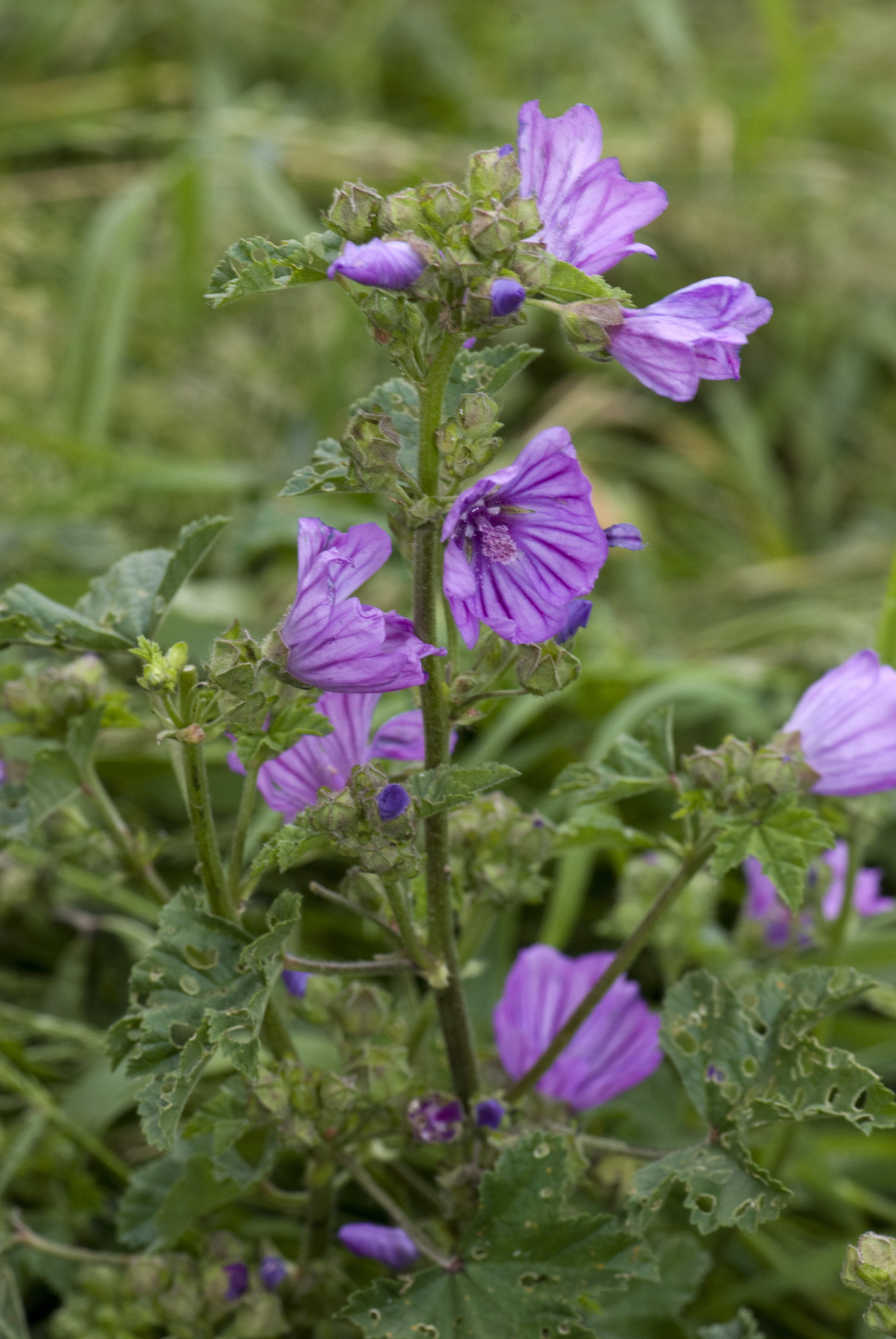 Malva sylvestris Bray-sur-Somme (Somme), France